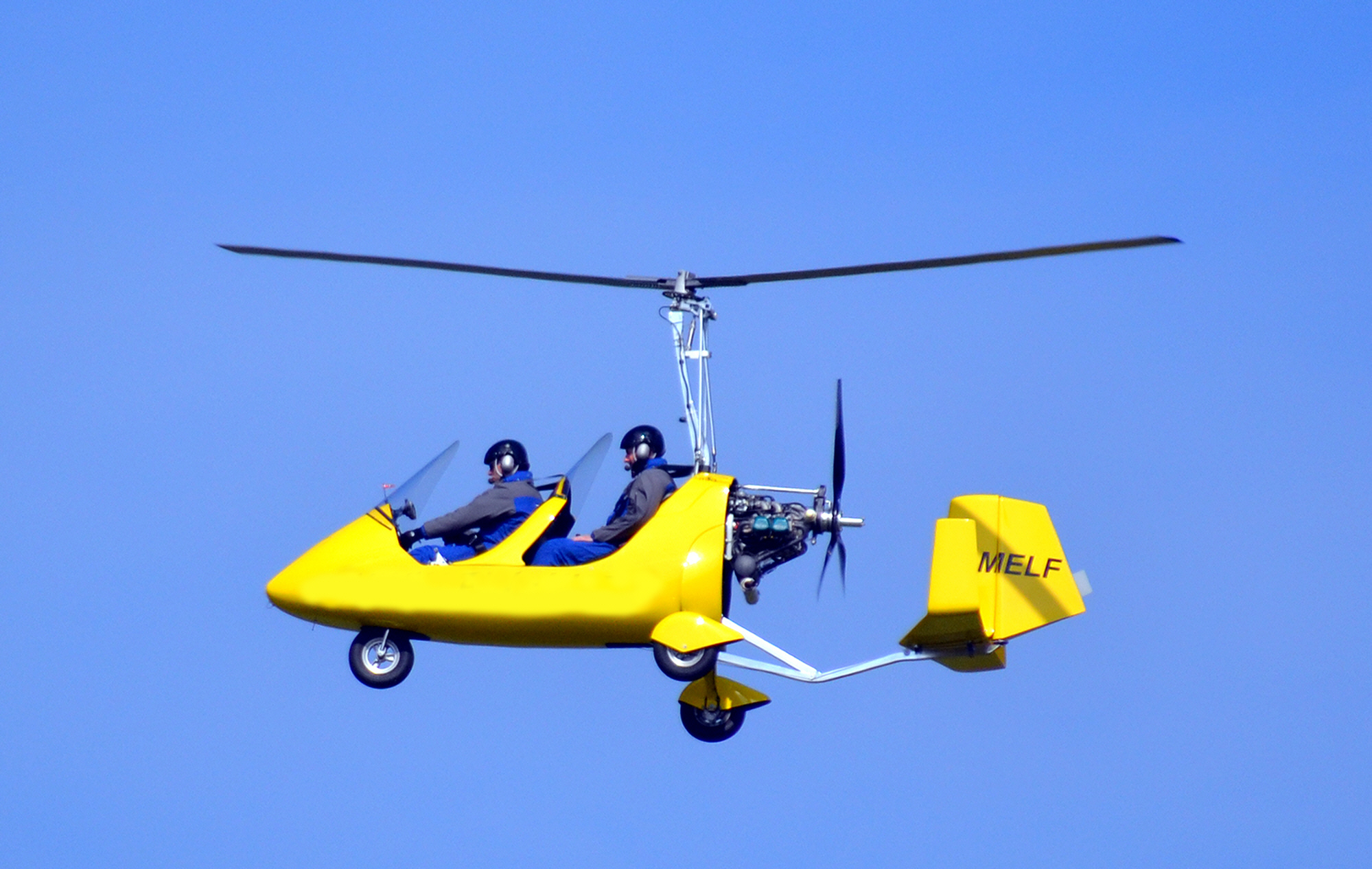 AutoGyro Europe MTOsport (D-MELF) auf dem Flugplatz Uetersen